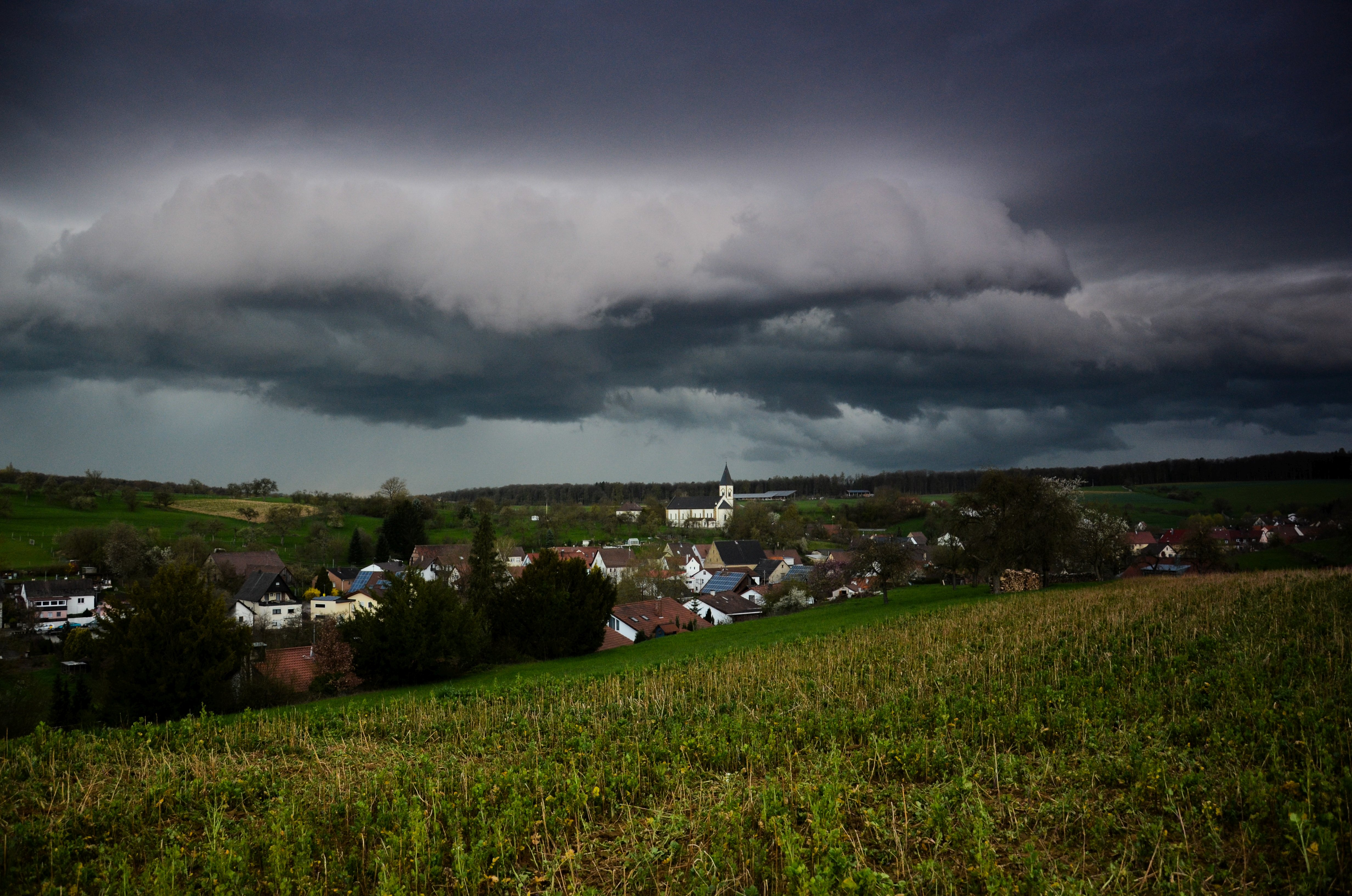 Herrannahendes Gewitter über Tiefenbach, Heilbronn